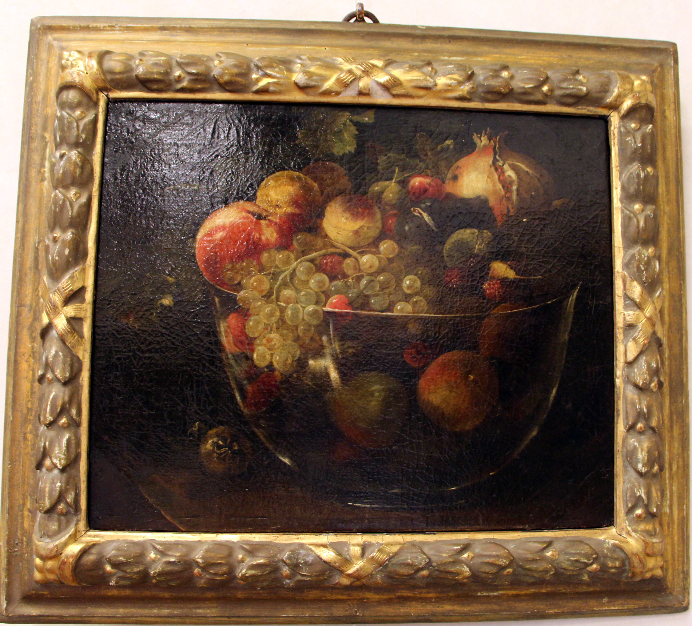 Villa medicea di Poggio a Caiano - MIBAC The making of this document was supported by Wikimedia CH. (Submit your project!) For all the files concerned, please see the category Supported by Wikimedia CH. This is a photo of a monument which is part of cultural heritage of Italy.